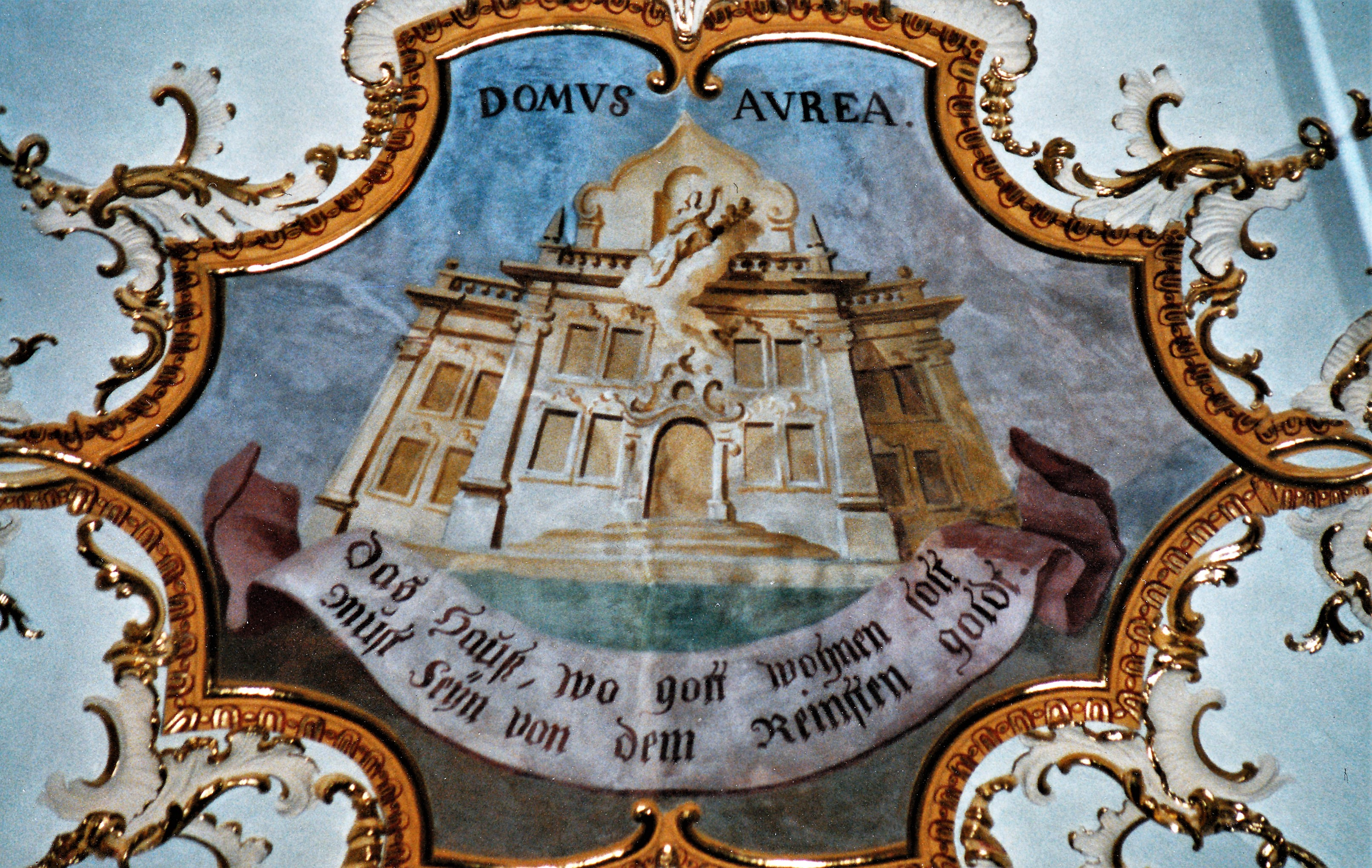 Maria Brünnlein - Fresko von Johann Baptist Zimmermann: Domus aurea (Goldenes Haus)